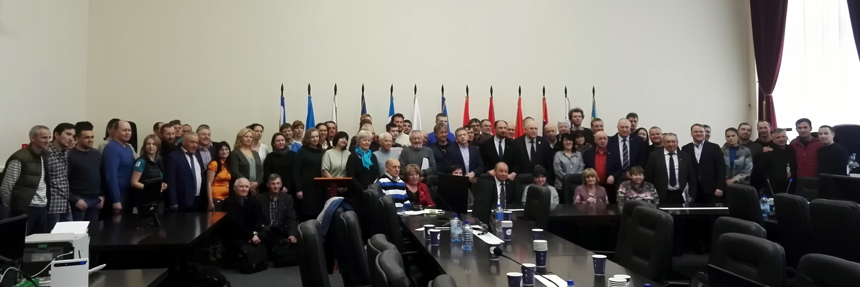 Конференция Федерации авиационного спорта России